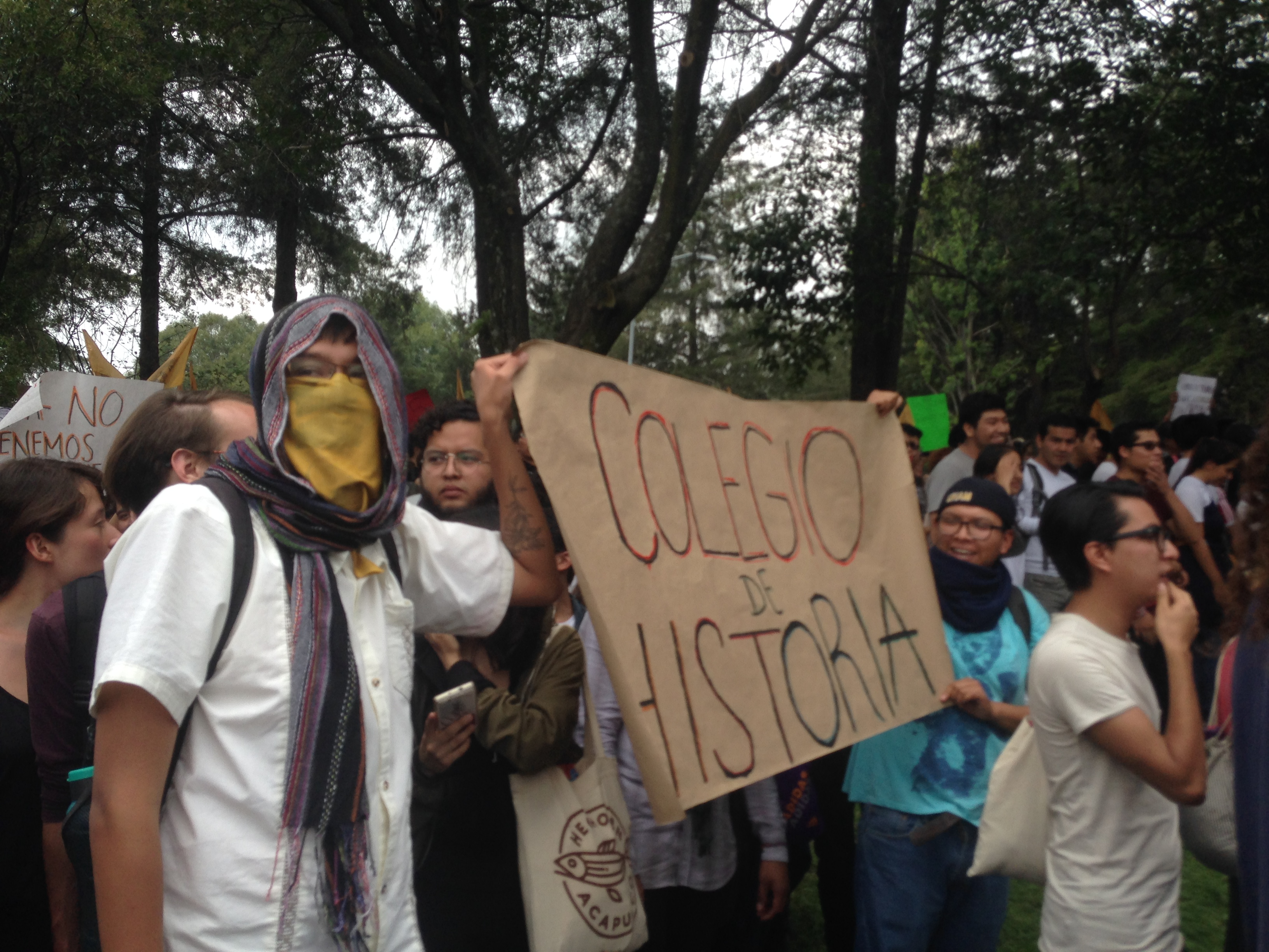 Contingente del Colegio de Historia, FFyL en la marcha en Ciudad Universitaria.